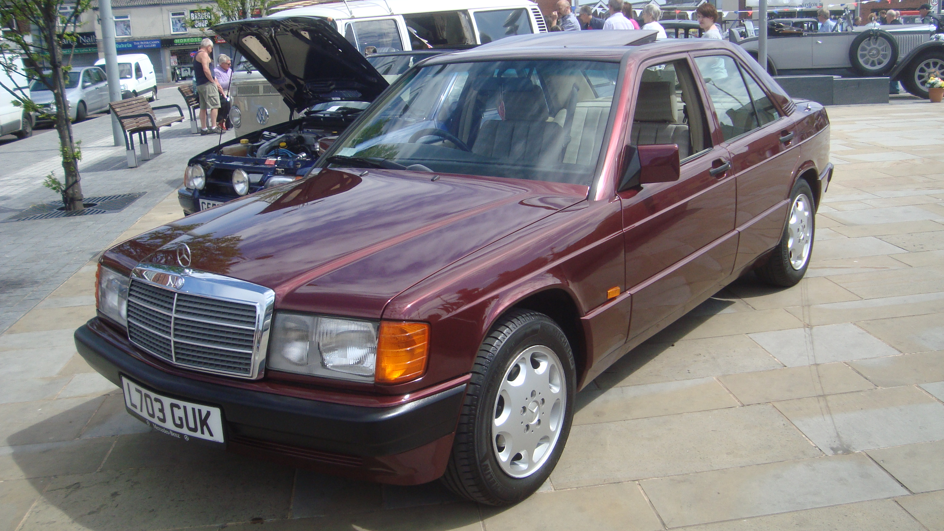 1993 Mercedes 190E Auto